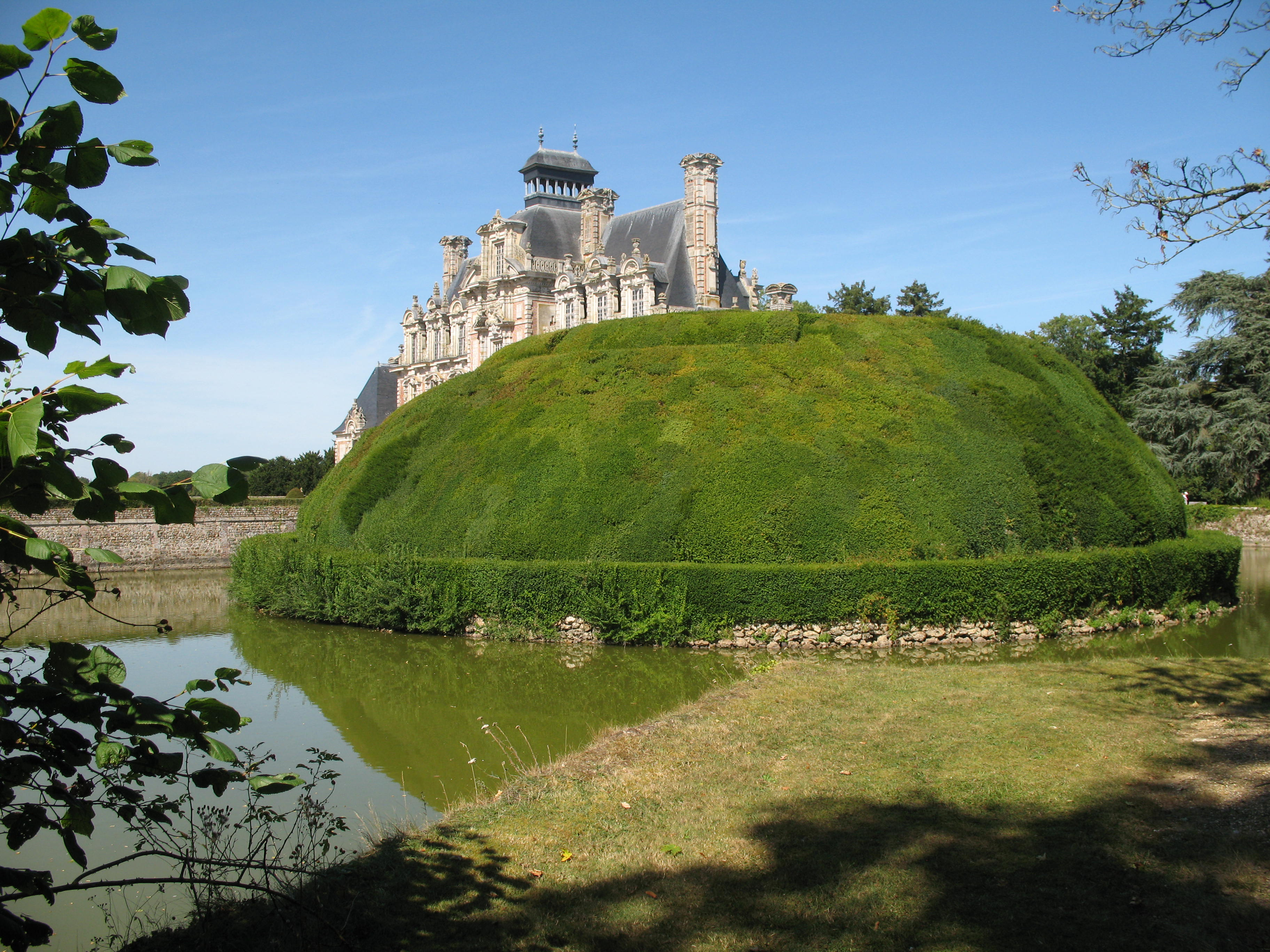 Château de Beaumesnil, à Beaumesnil dans l'Eure